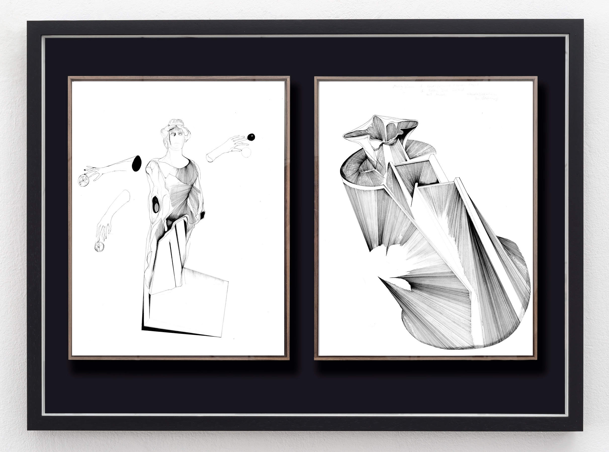 Nina Annabelle Märkl, Shifting Perceptions - Antike Applikationen, 365x280mm, Tusche und Bleistift auf Papier